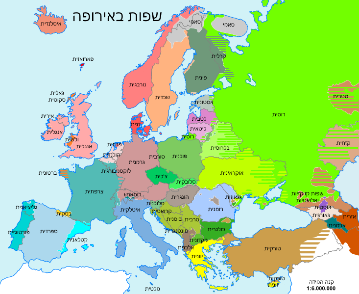 גרסה עברית למפה המתארת את השפות האירופאיות ואת תפוצתן.